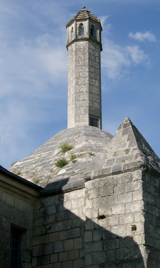 Lanterne des morts, chapelle Sainte-Catherine, Fontevraud-l'Abbaye, Maine-et-Loire, France